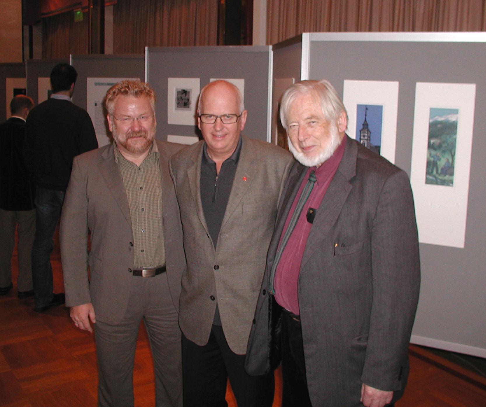 Terje Grøstad, Eyvind Skeie og Klaus Erik Krogh. Fra Kirkemøtet 2005.